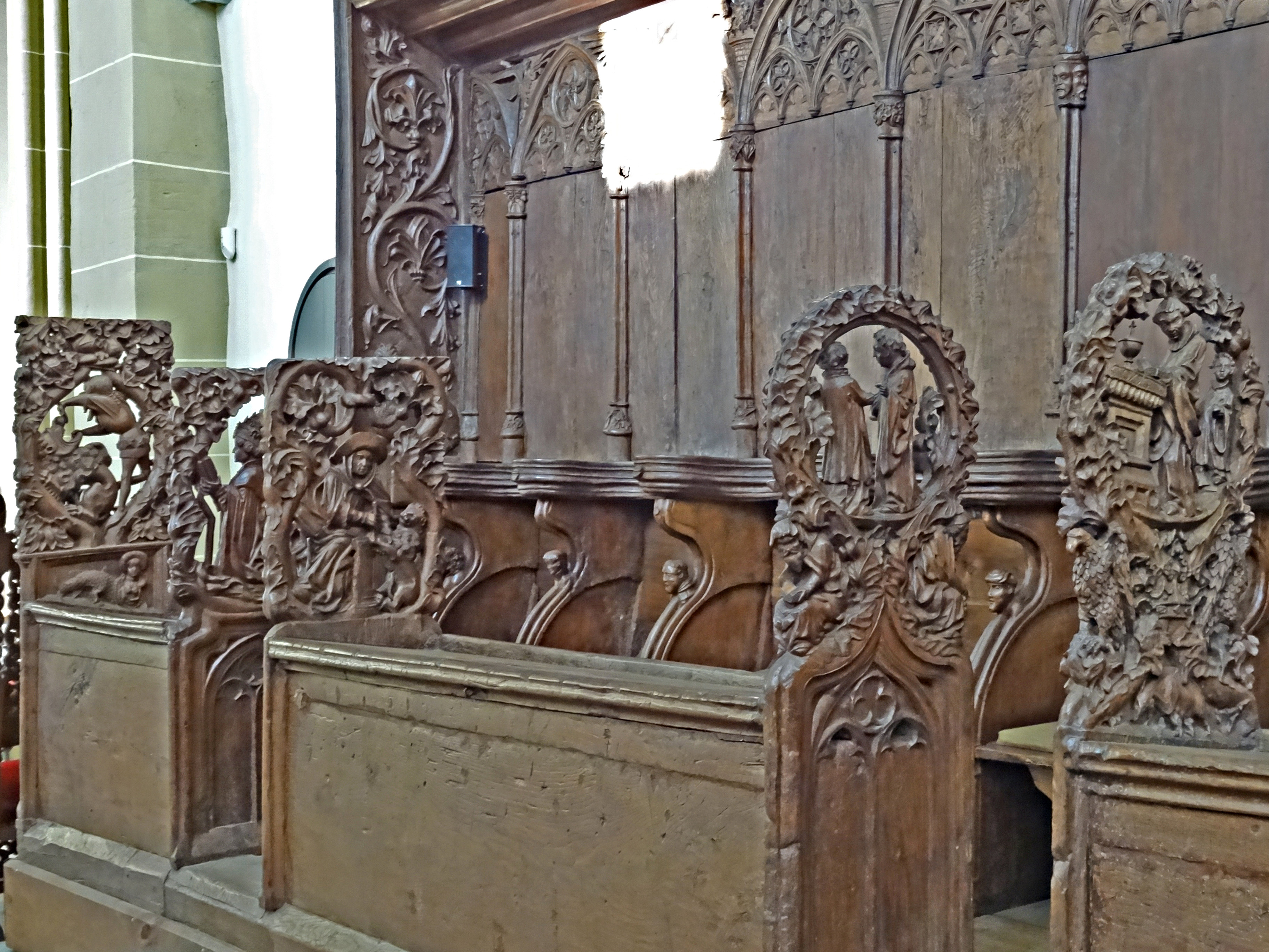 nördliches Chorgestühl im Dom zum Heiligen Kreuz Nordhausen